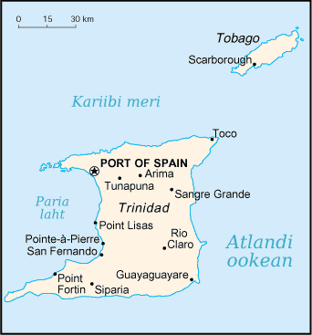 Trinidadi ja Tobago kaart